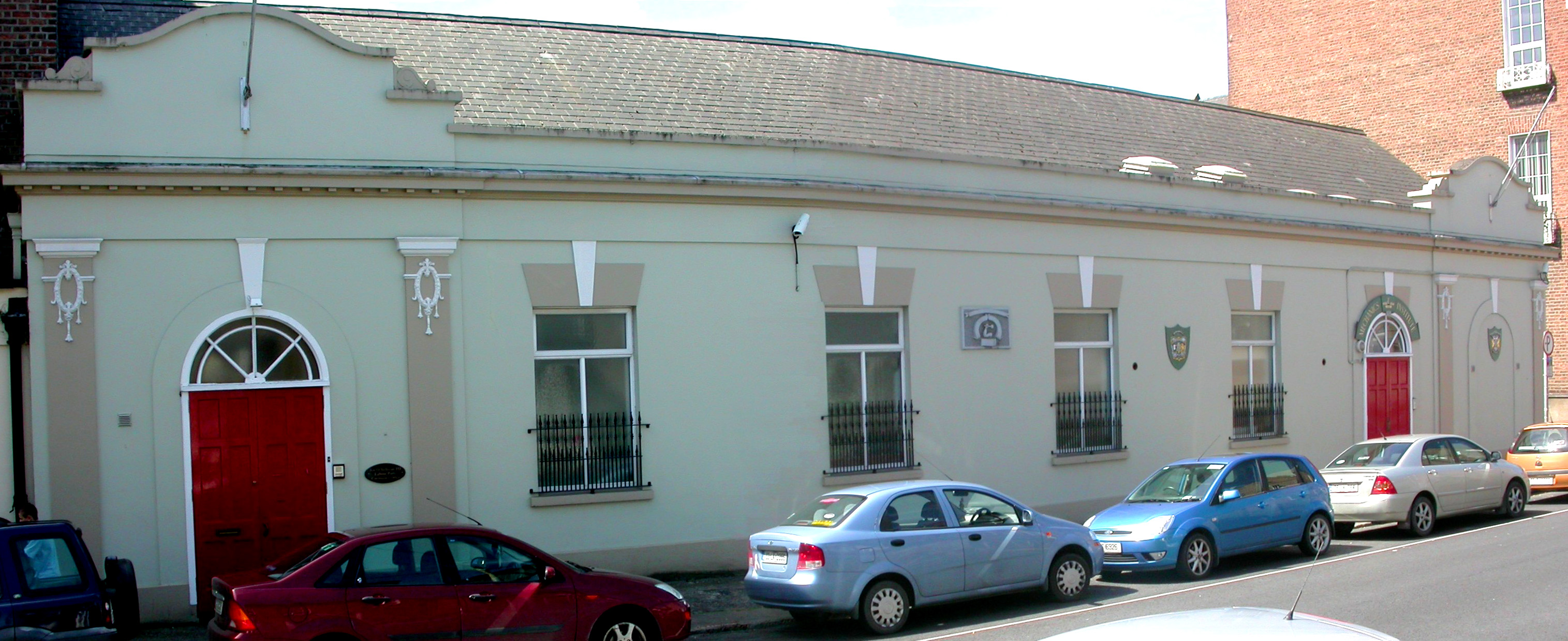 Foras na Meicneoiri, Luimneach